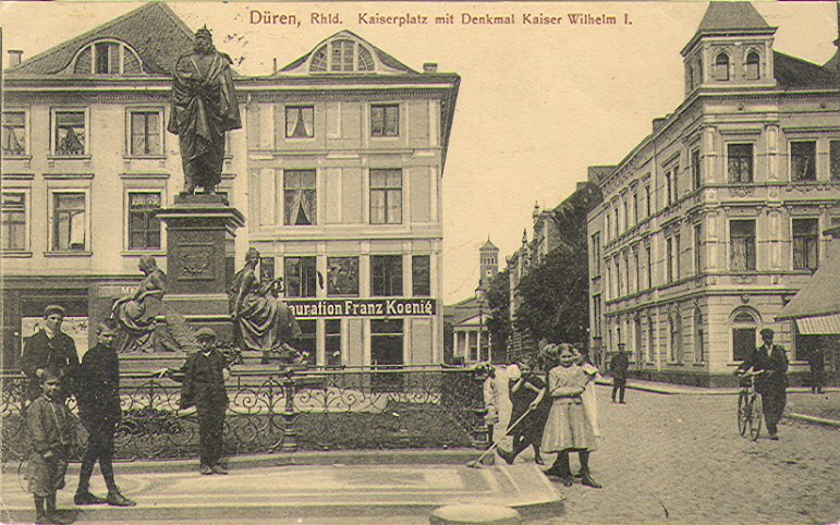 Das Kaiser Wilhelm I.-Standbild in Düren